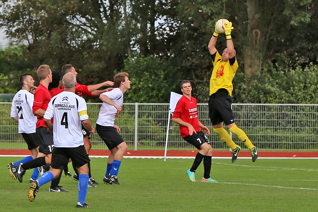 Doelman Jürgen Belpaire in volle actie.